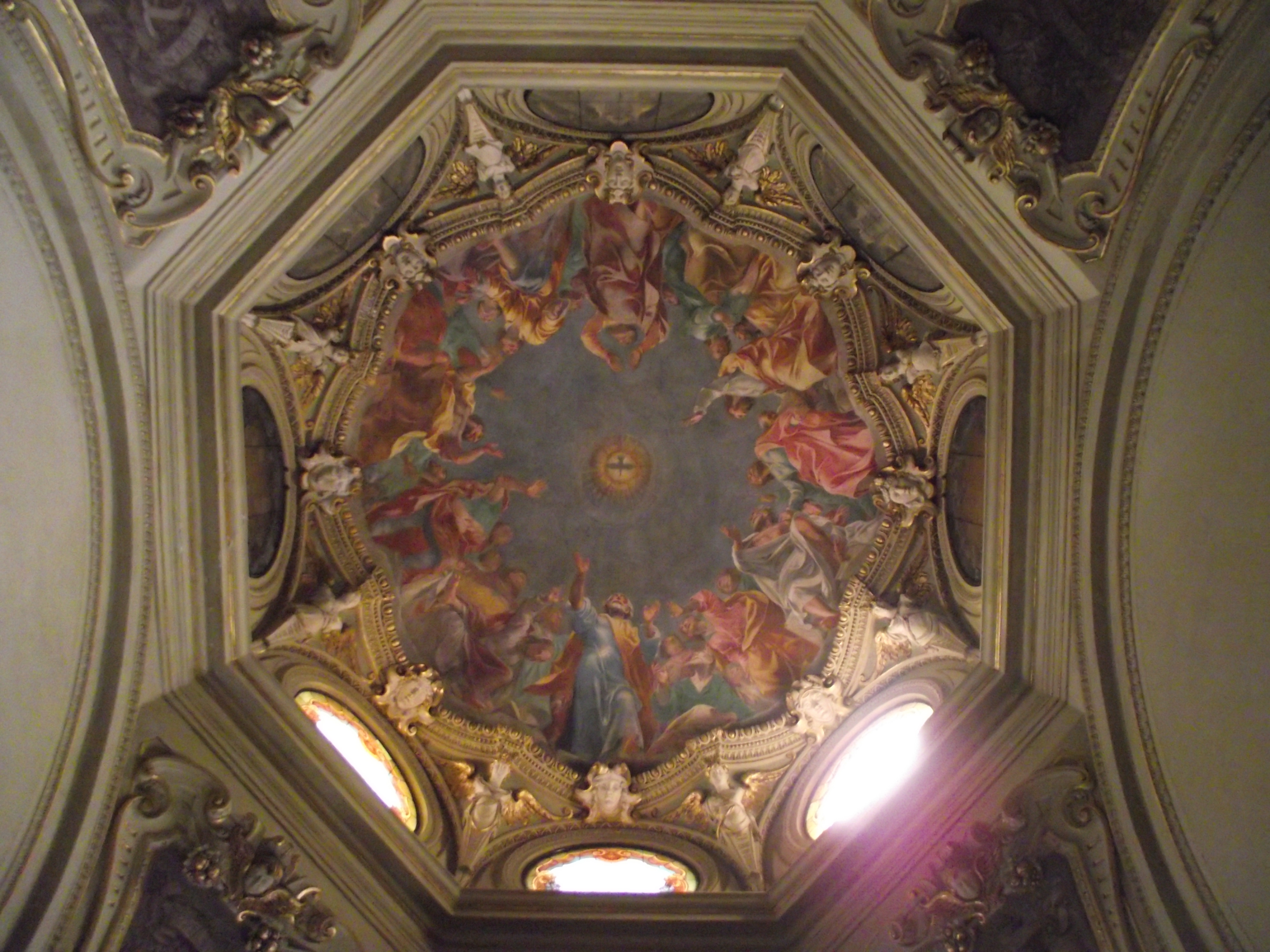 Cupola della Cappella di San Giuseppe